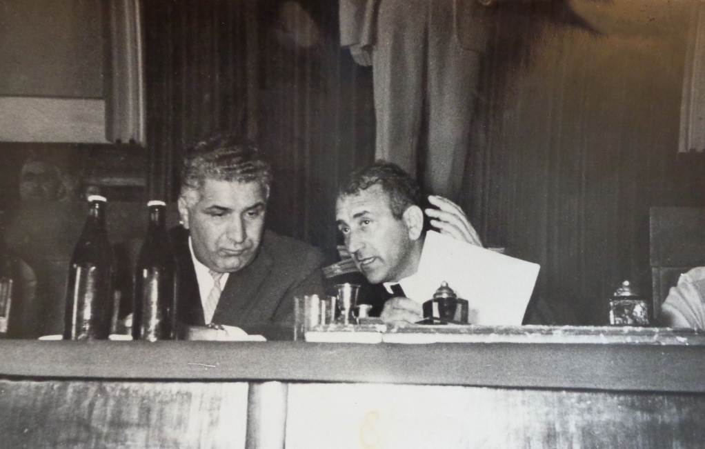 Cəlil Cavadov Vəli Axundov ilə